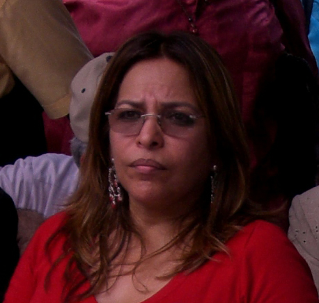 Fotografía de Balbina Herrera durante una presentación artistica.